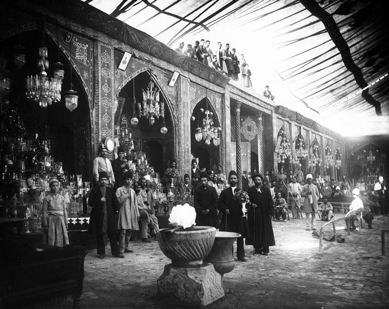 Copper Bazar Isfahan